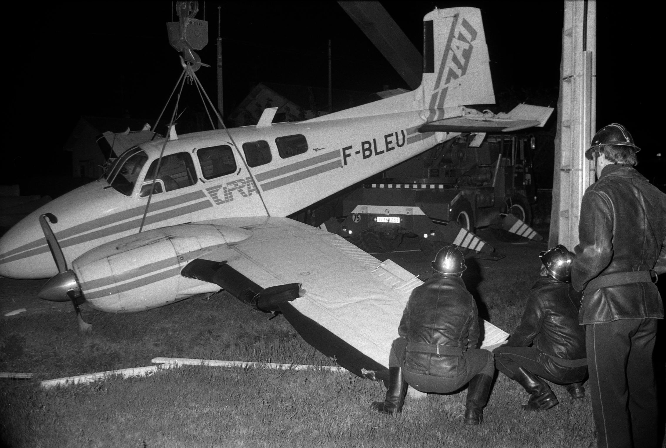 Route départementale 16 à l'entrée de Labège. Nuit du 3 au 4 octobre 1978. Vue d'ensemble d'un avion d'affaires endommagé en travers d'une route (vue de côté), est entouré de cables, prêt à être soulevé par une grue ; au 1er plan vue de dos de deux pompiers accroupis tenant l'aile gauche, derrière-eux pompier debout. Vue de nuit. Cliché pris après l'atterrissage d'urgence d'un avion bi-moteur sur une route. Observation: L'avion venait de décoller de Carcassone à destination de Dinard. Suite à une panne des deux moteurs, l'avion a du se poser en catastrophe sur la route départementale. Les 4 occupants en sont sortis indemnes.